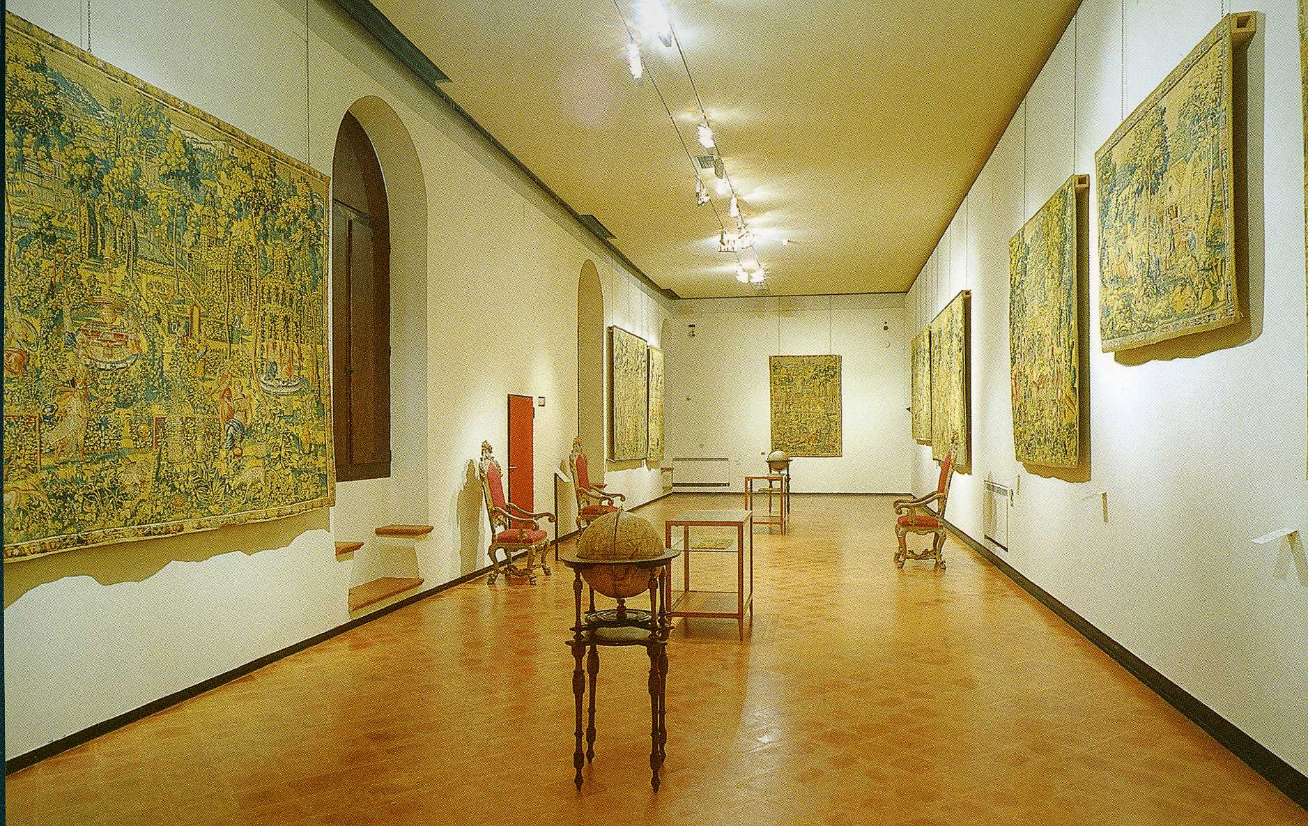 Salone degli Arazzi contenente nove arazzi fiamminghi